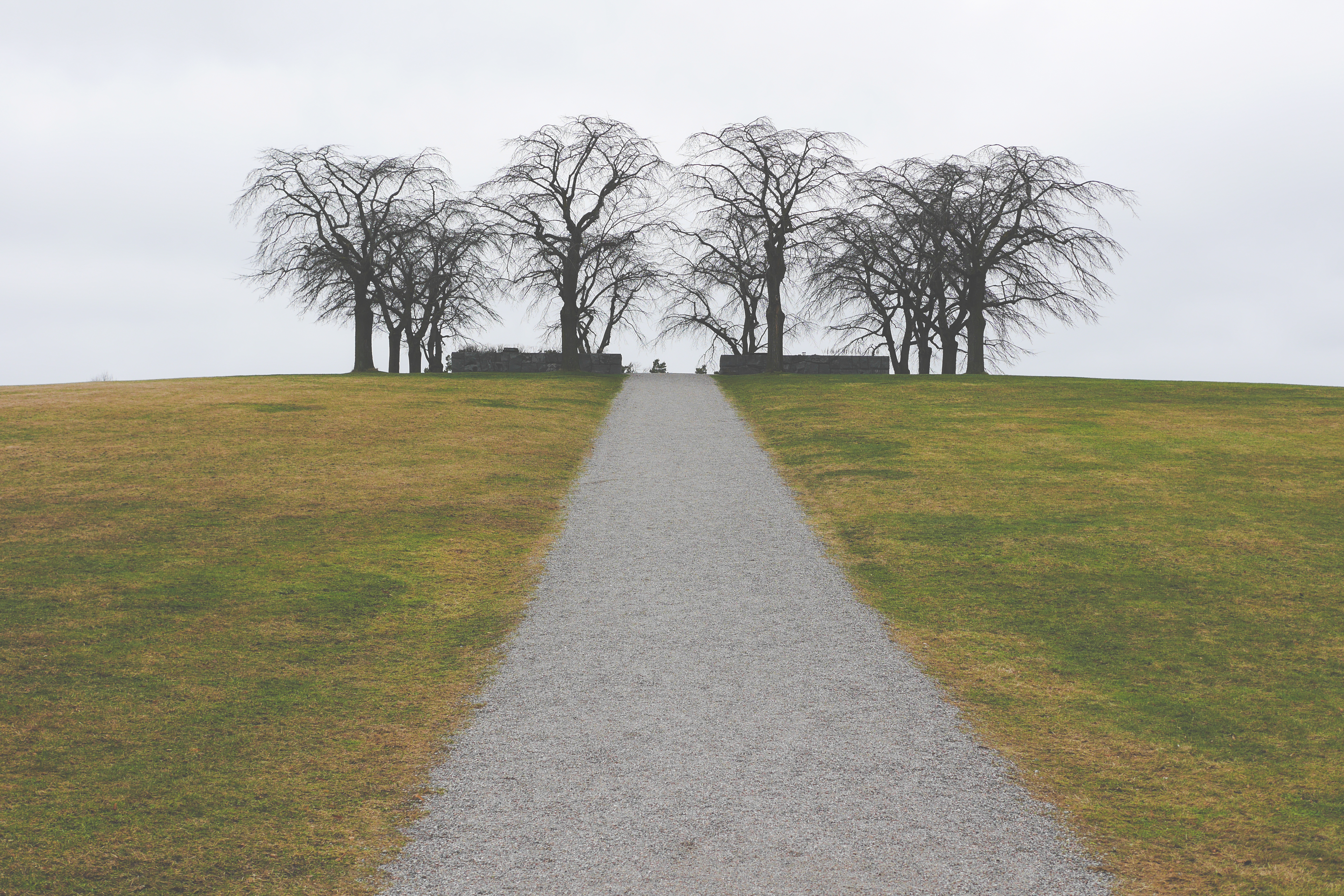 Gruza vojo en gazono supren al montpinto kie staras senfoliaj arboj ĉirkaŭ intermureta areo.